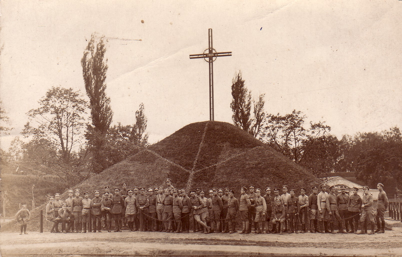 Zdjęcie kopca w Bobrujsku ze zbiorów majora Stanisława Nowickiego urodzony 1896 w Oczesałach, zmarł w 1964 w Warszawie (pochowany na cmentarzu Powązki wojskowe).